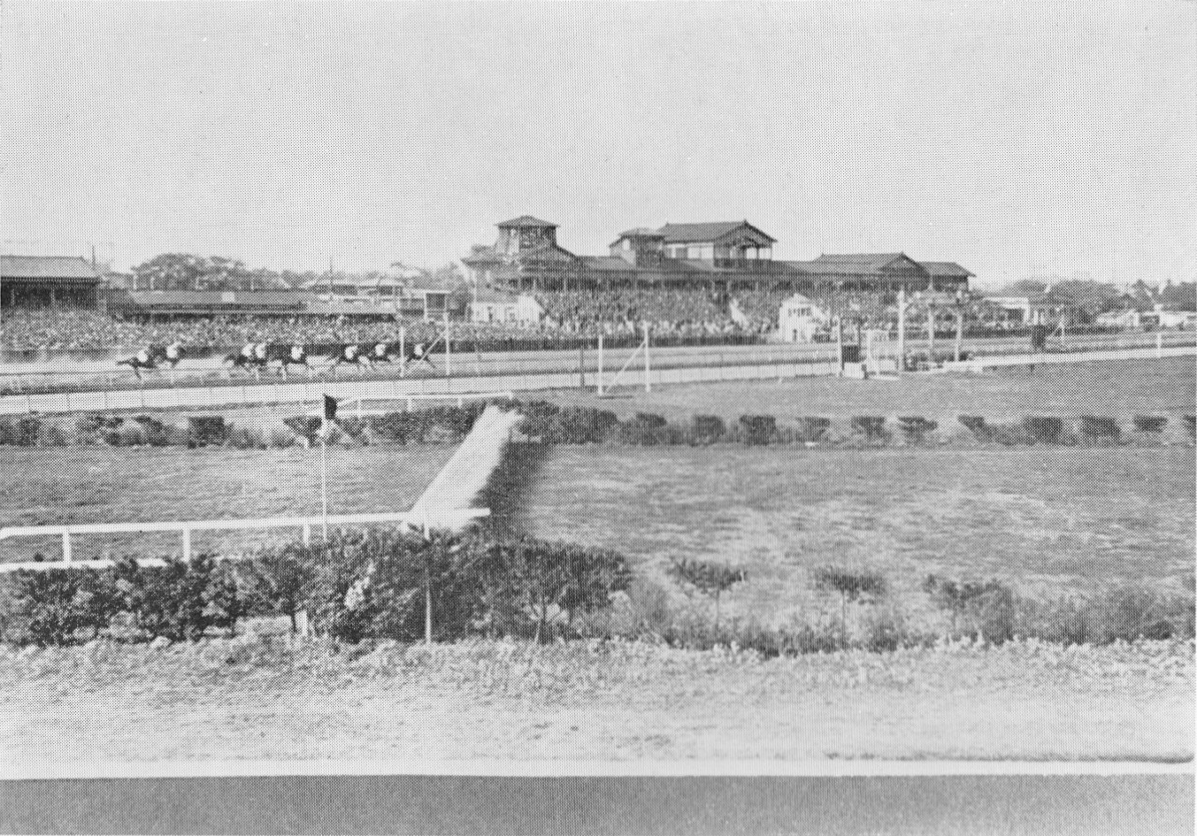 東京競馬倶楽部時代の目黒競馬場風景